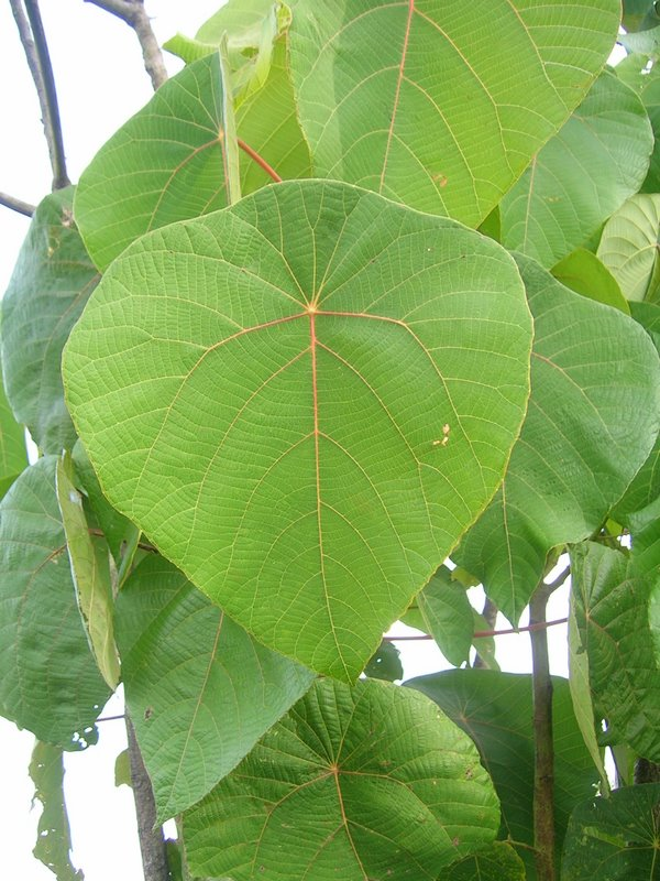 Macaranga peltata from Dandeli, India